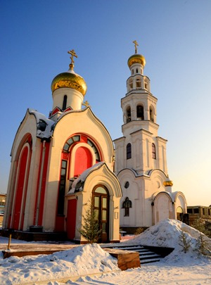 Воскресенский кафедральный собор в Кызыле в январе 2017 года